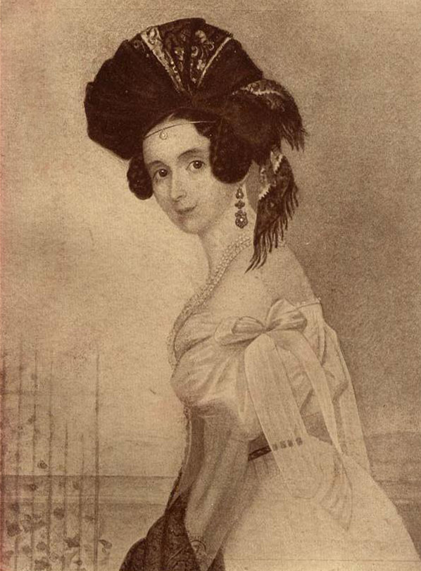 Антуанетта Петровна Лазарева, ур. Бирон (1813-1882), дочь принца Густава-Каликиста Бирона и графини Фанни-Луизы-Франциски Мальцан; жена Л.Е.Лазарева (1797-1871).